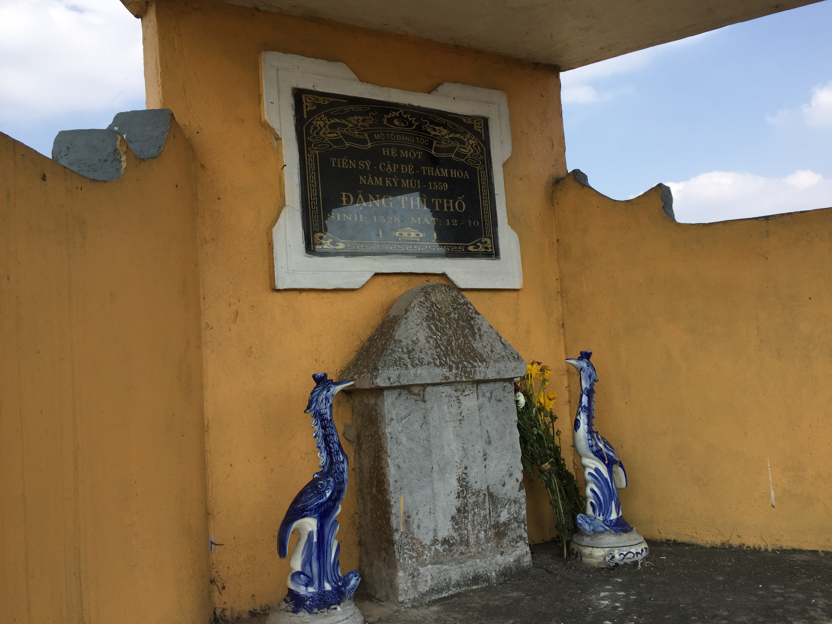 Mộ cụ Đặng Thì Thố ở cánh đồng thôn Thạc